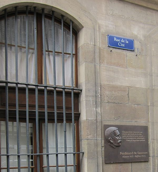 Gedenktafel am Geburtshaus von Ferdinand de Saussure, Genf